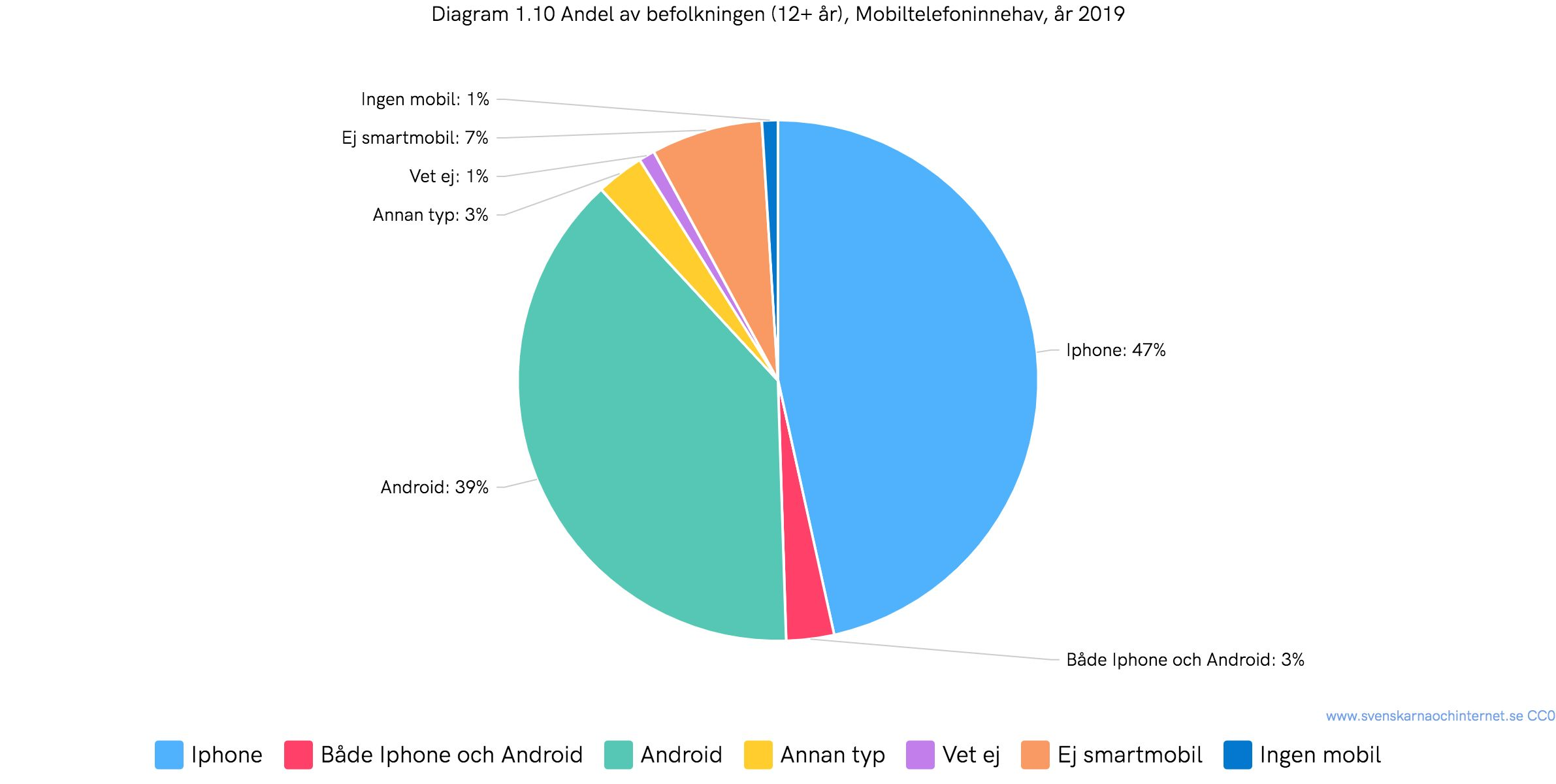 Andel av Sveriges befolkning (+12 år), Mobiltelefoninnehav